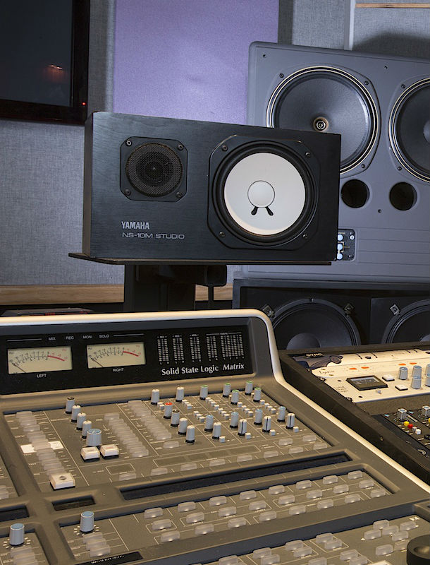 Yamaha NS10